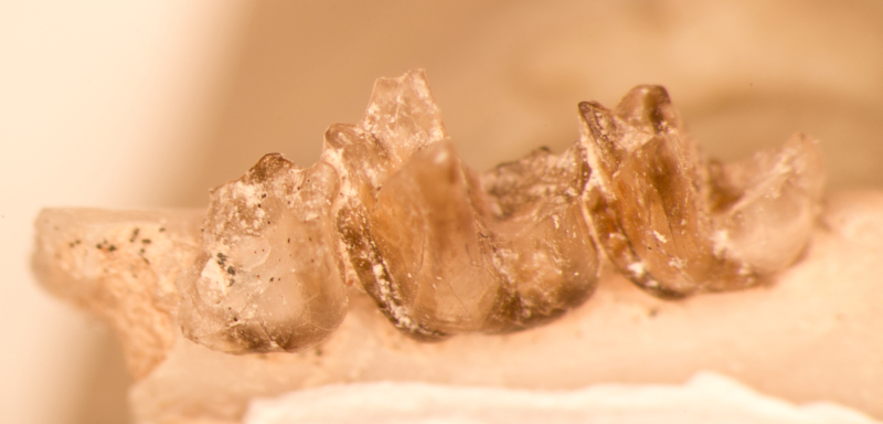 Centetodon magnus (Clark)